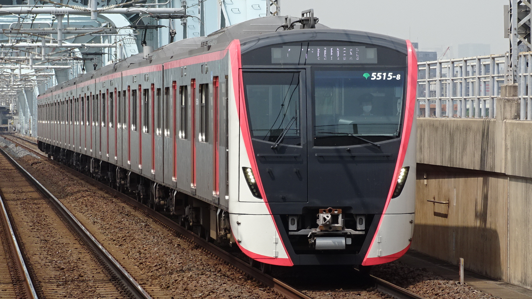 令和2年6月5日、四ツ木駅にて撮影 Sony Cyber-shot DSC-HX400V